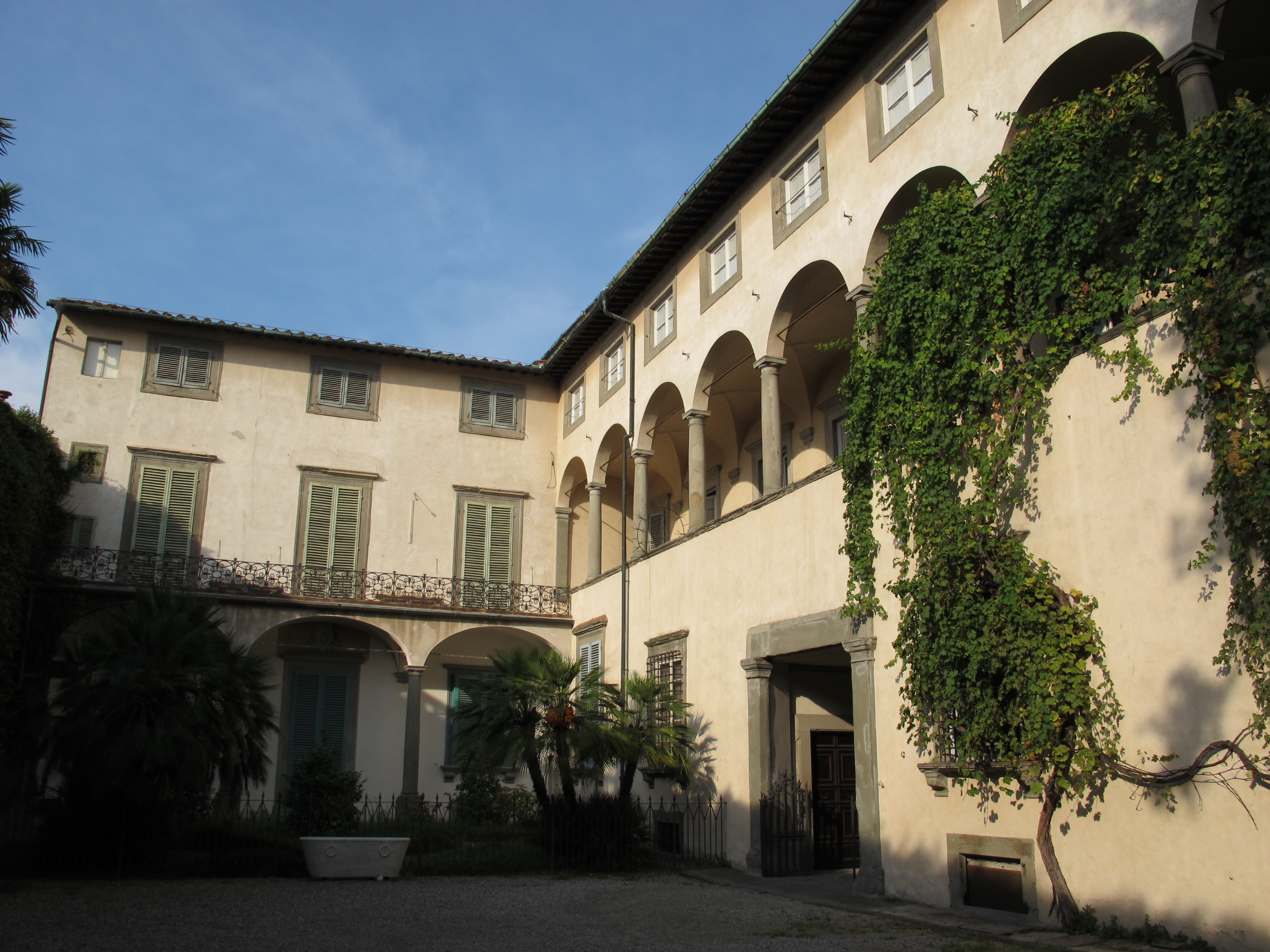 Palazzo mansi, cortile